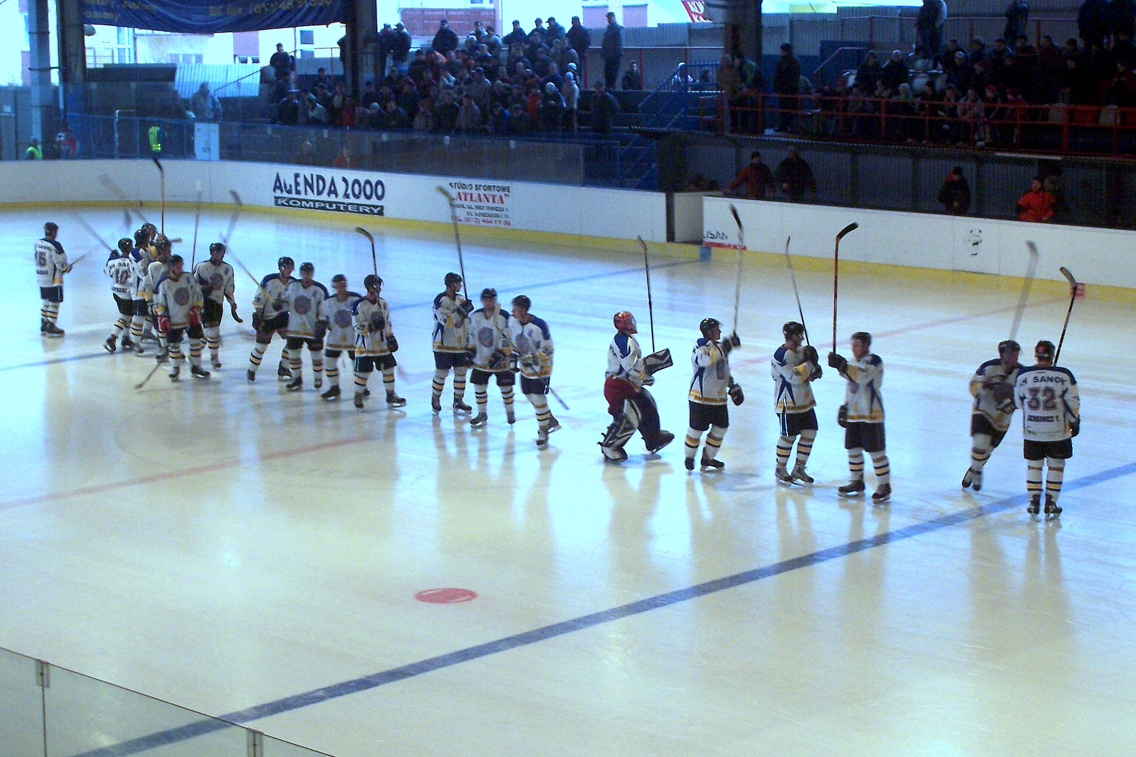 Drużyna KH Sanok przed ostatnim meczem na lodowisku Torsan ze Stoczniowcem Gdańsk, Sanok 21 marca 2006